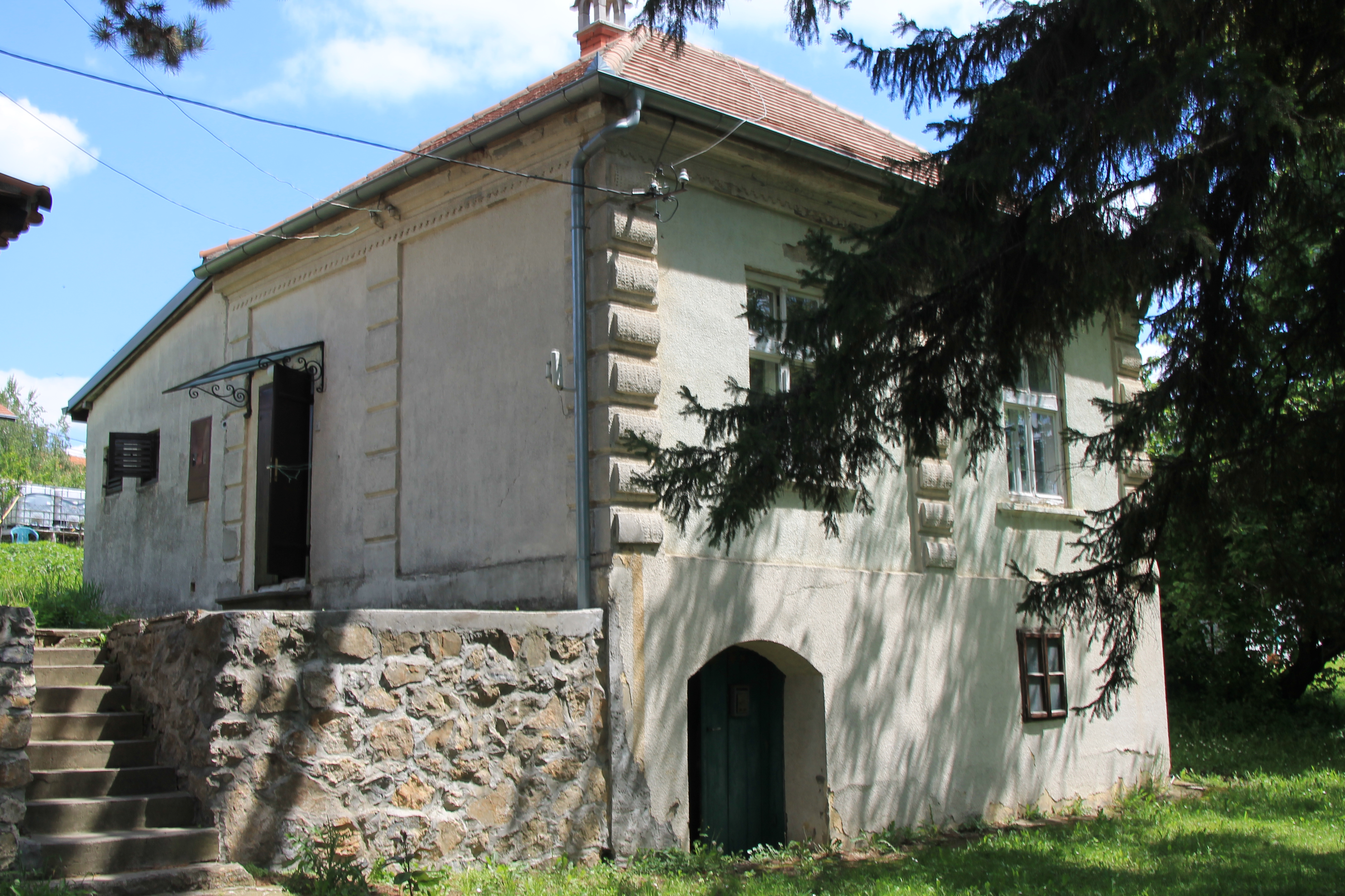 Okućnica Ilije Miloševića